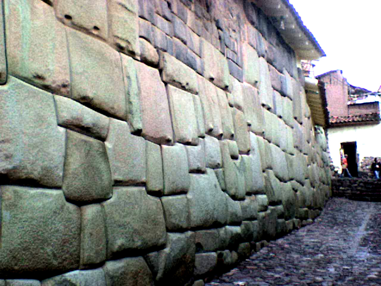 Muros laterales del palacio de Inca Roca